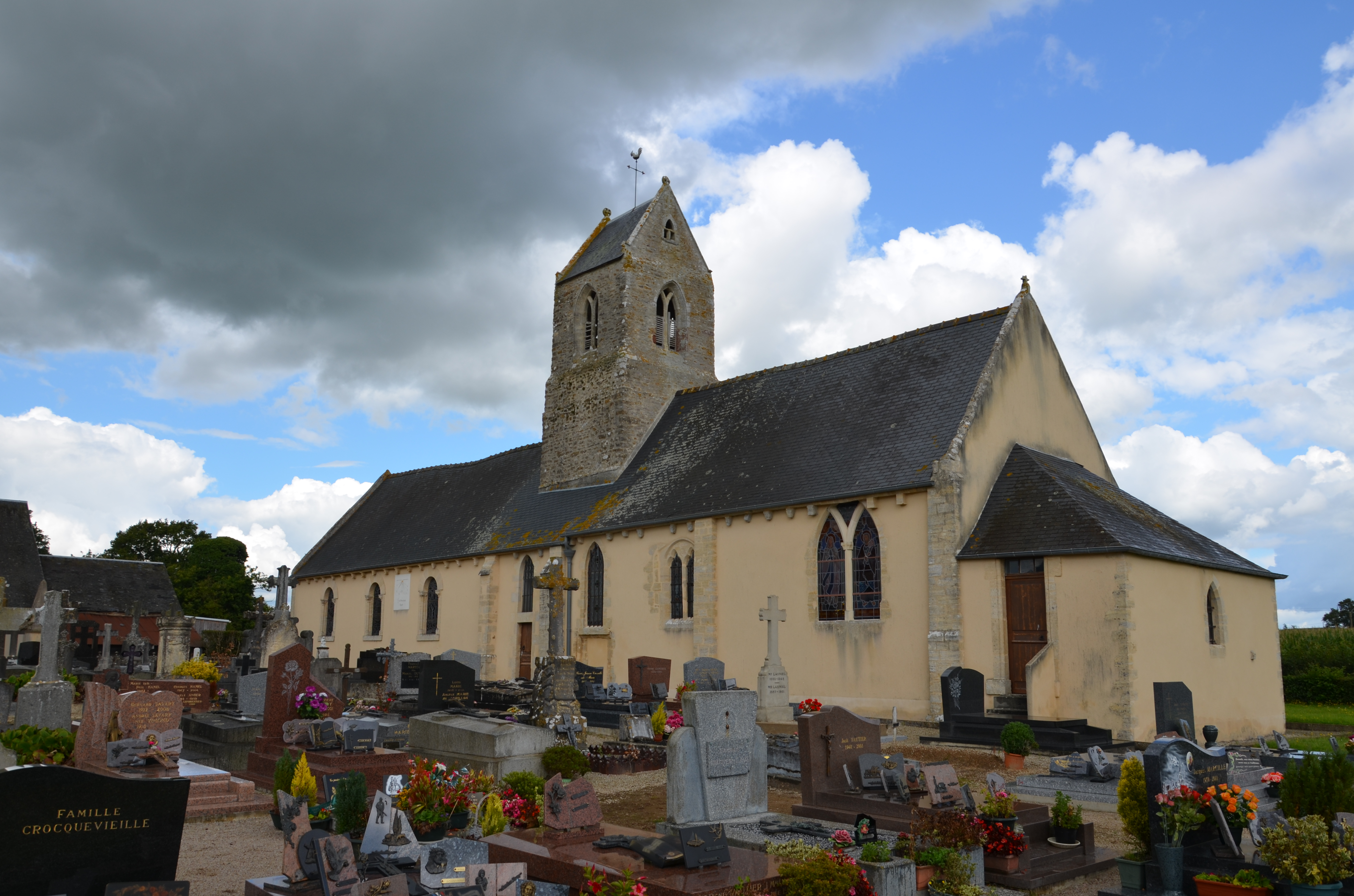 Église Saint-Pierre de La Folie.